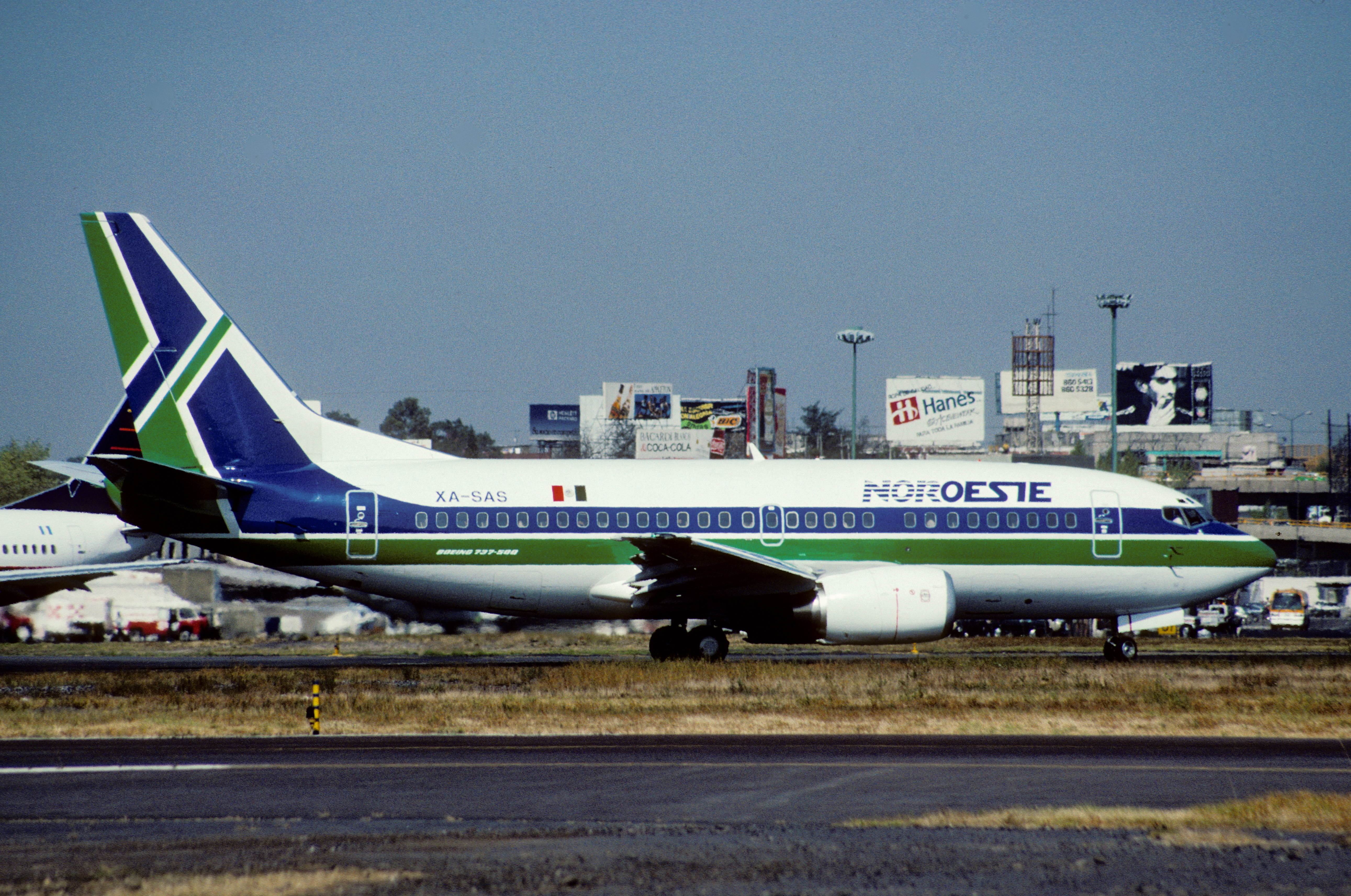 Noroeste Boeing 737-500; XA-SAS@MEX, December 1992